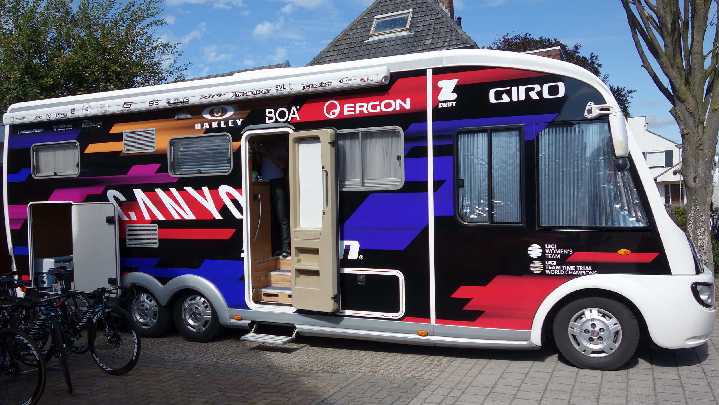 Bus van Canyon-SRAM bij de start van de eerste etappe van Stramproy naar Weert in de Boels Ladies Tour 2019